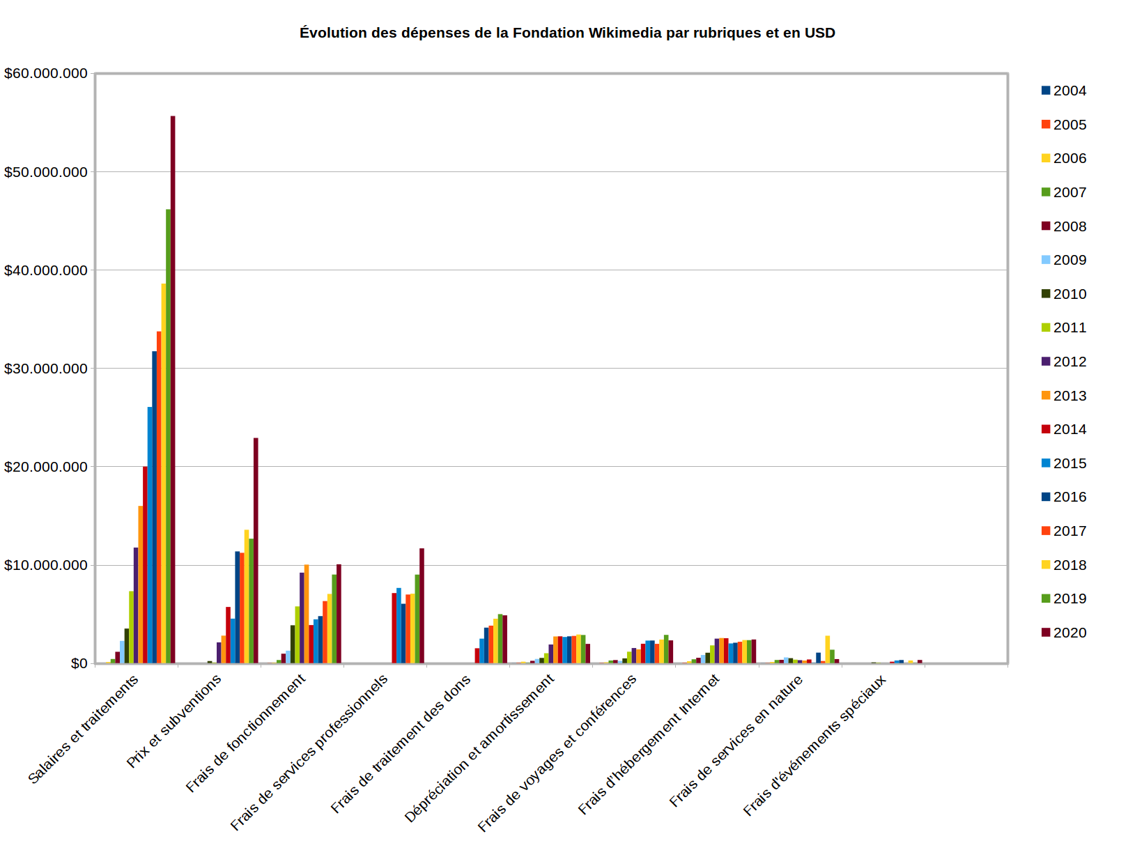 Évolution des dépenses de la fondation Wikimédia. Sources